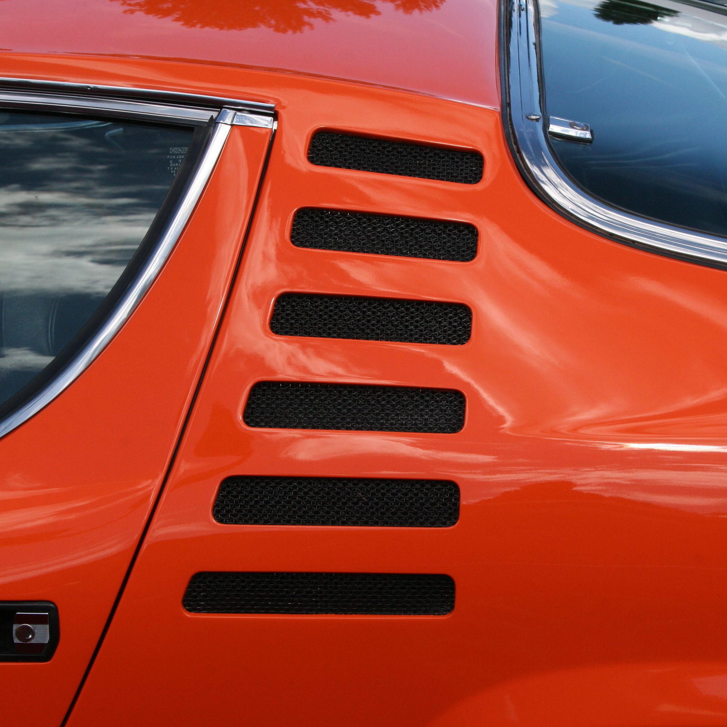 Alfa Romeo Montreal C pillar